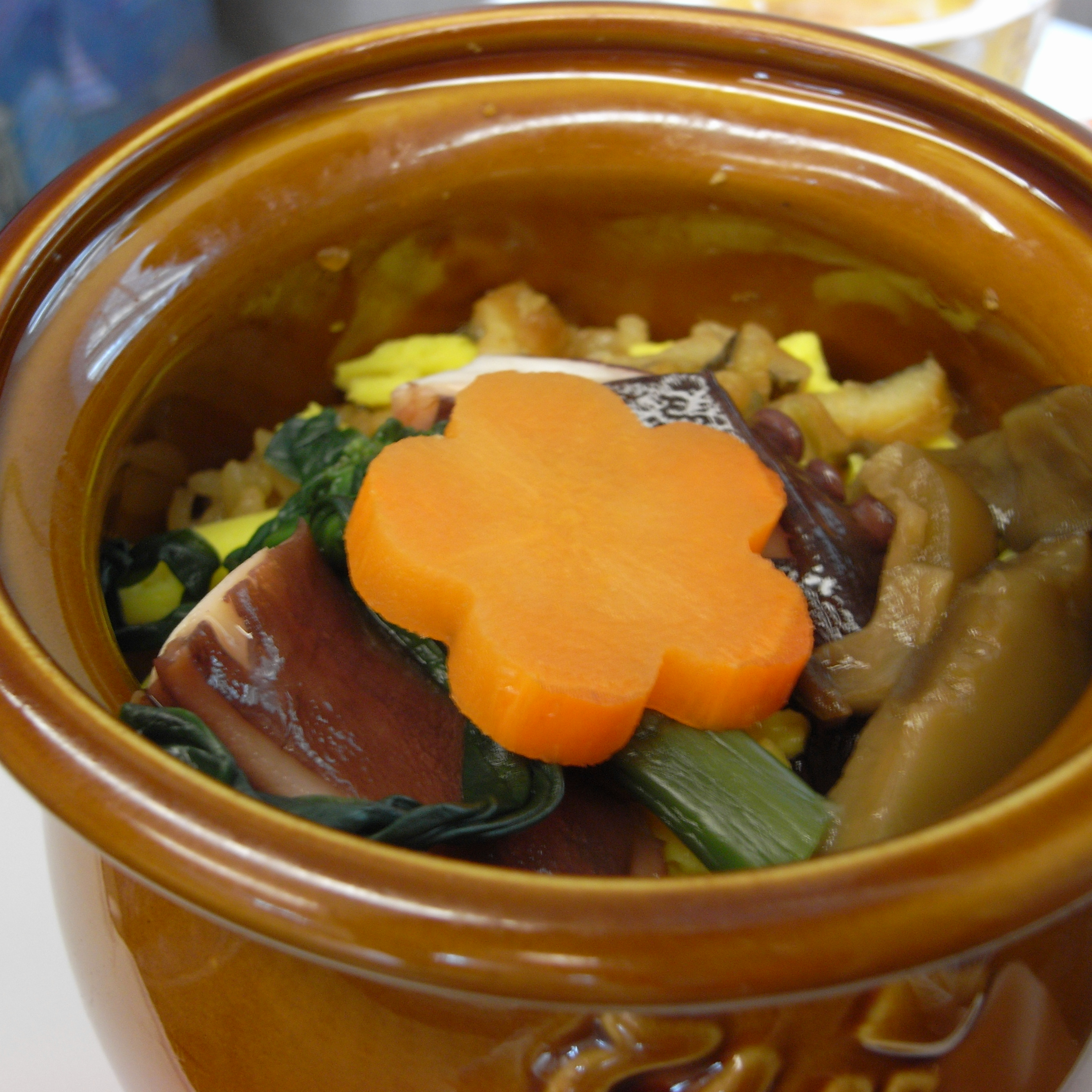 タコ飯